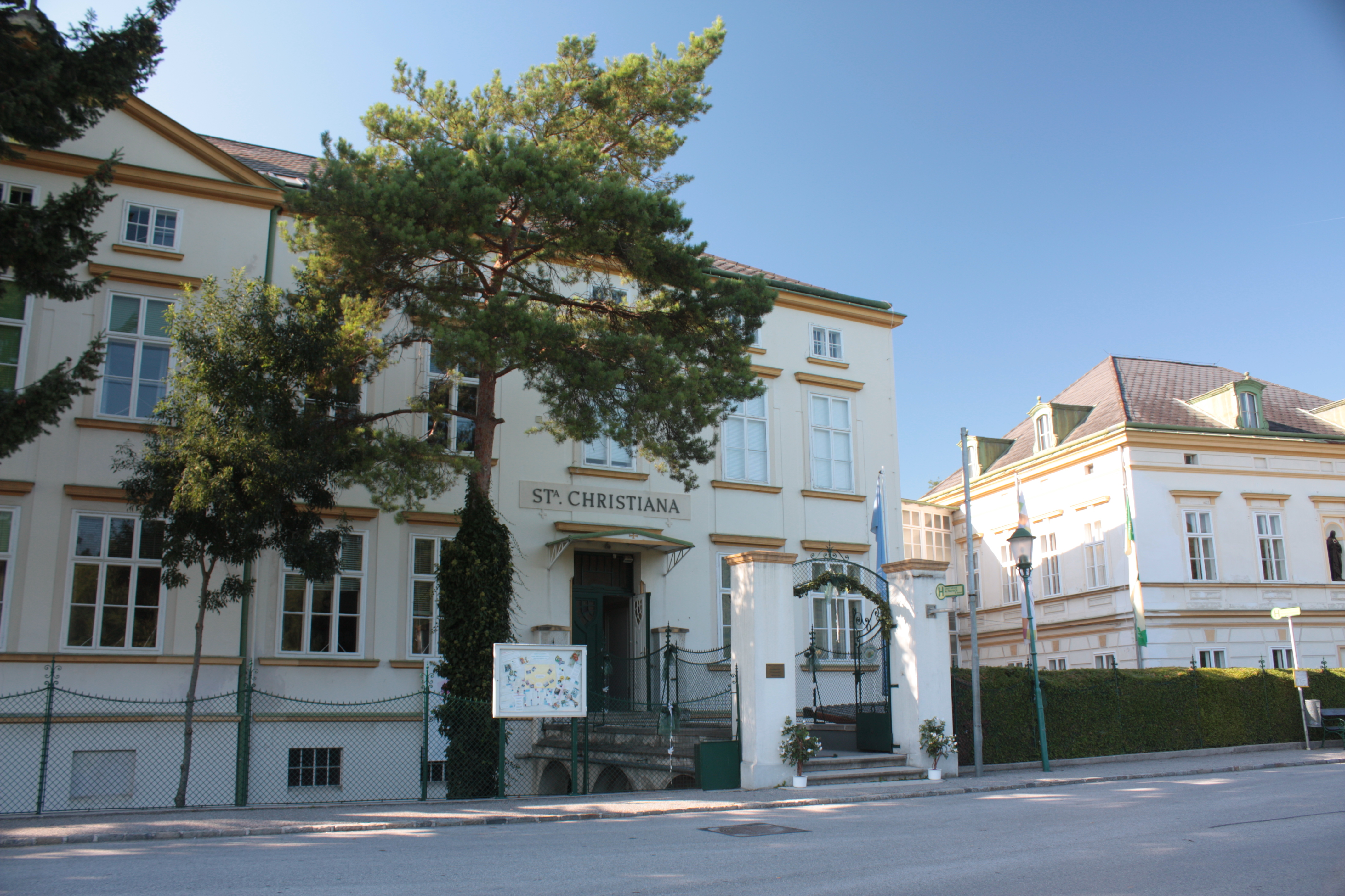 Schule, ehem. Kloster Santa Christiana